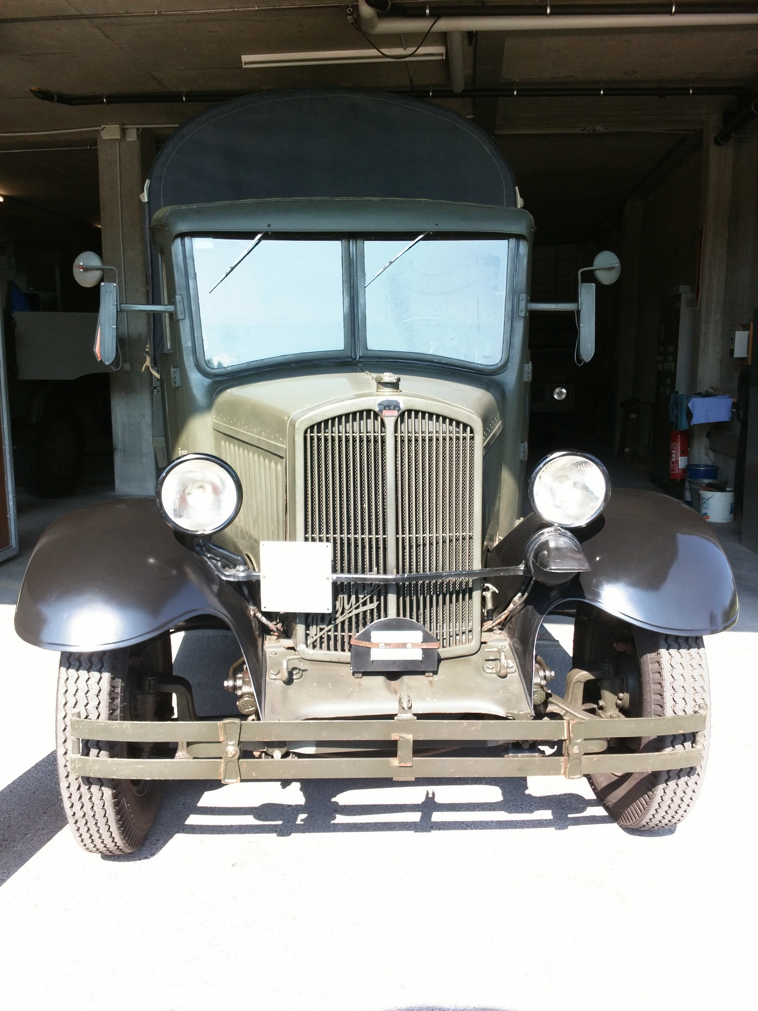 Berna L275 front